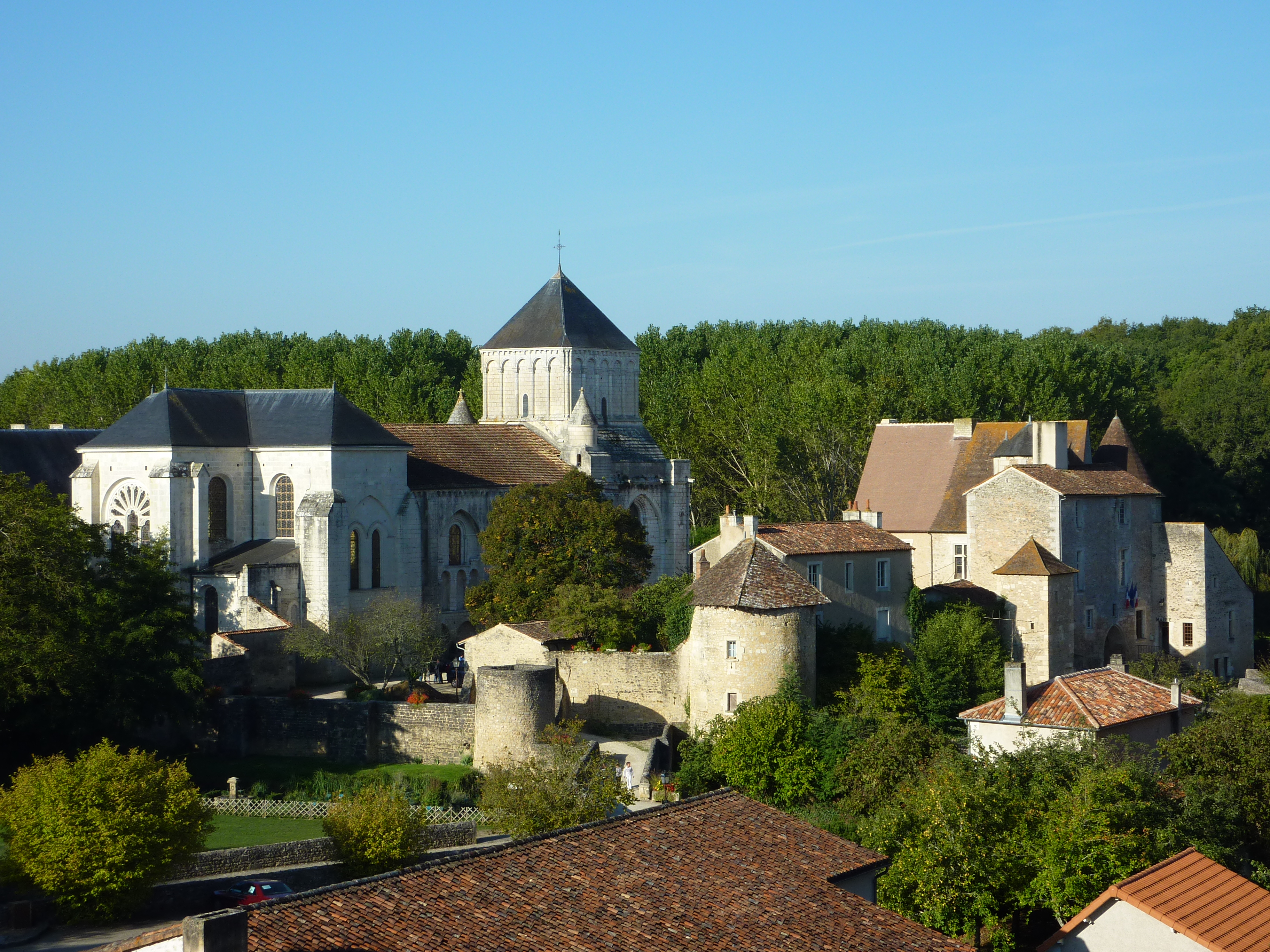 Abbaye de Nouaillé-Maupertuis (Vienne, France)